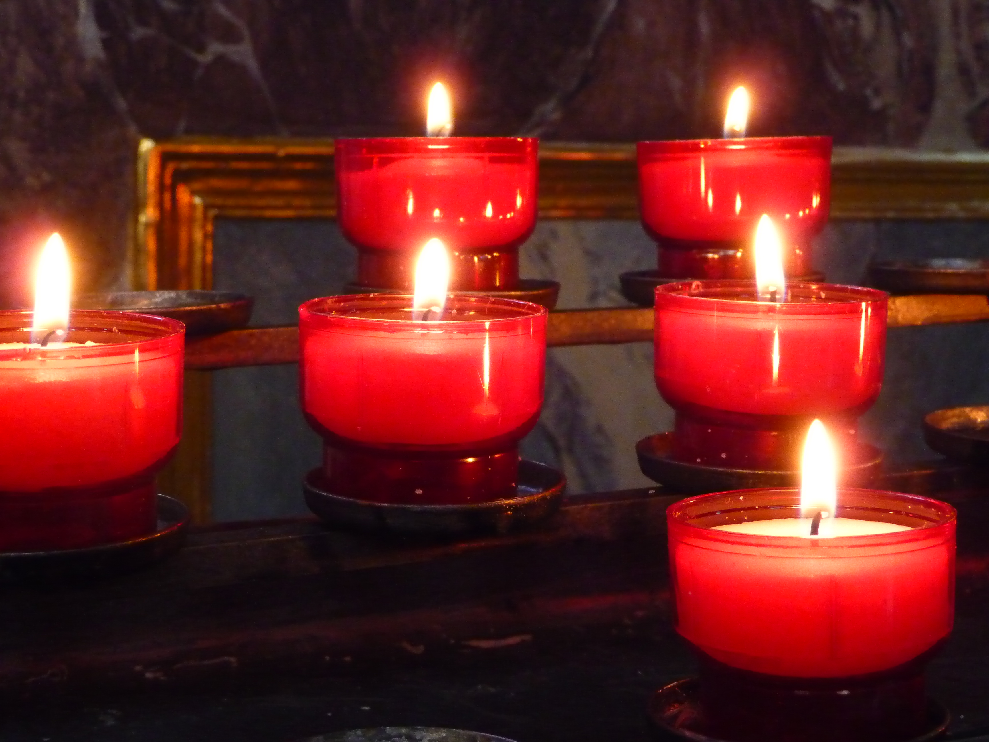 Opferlichter